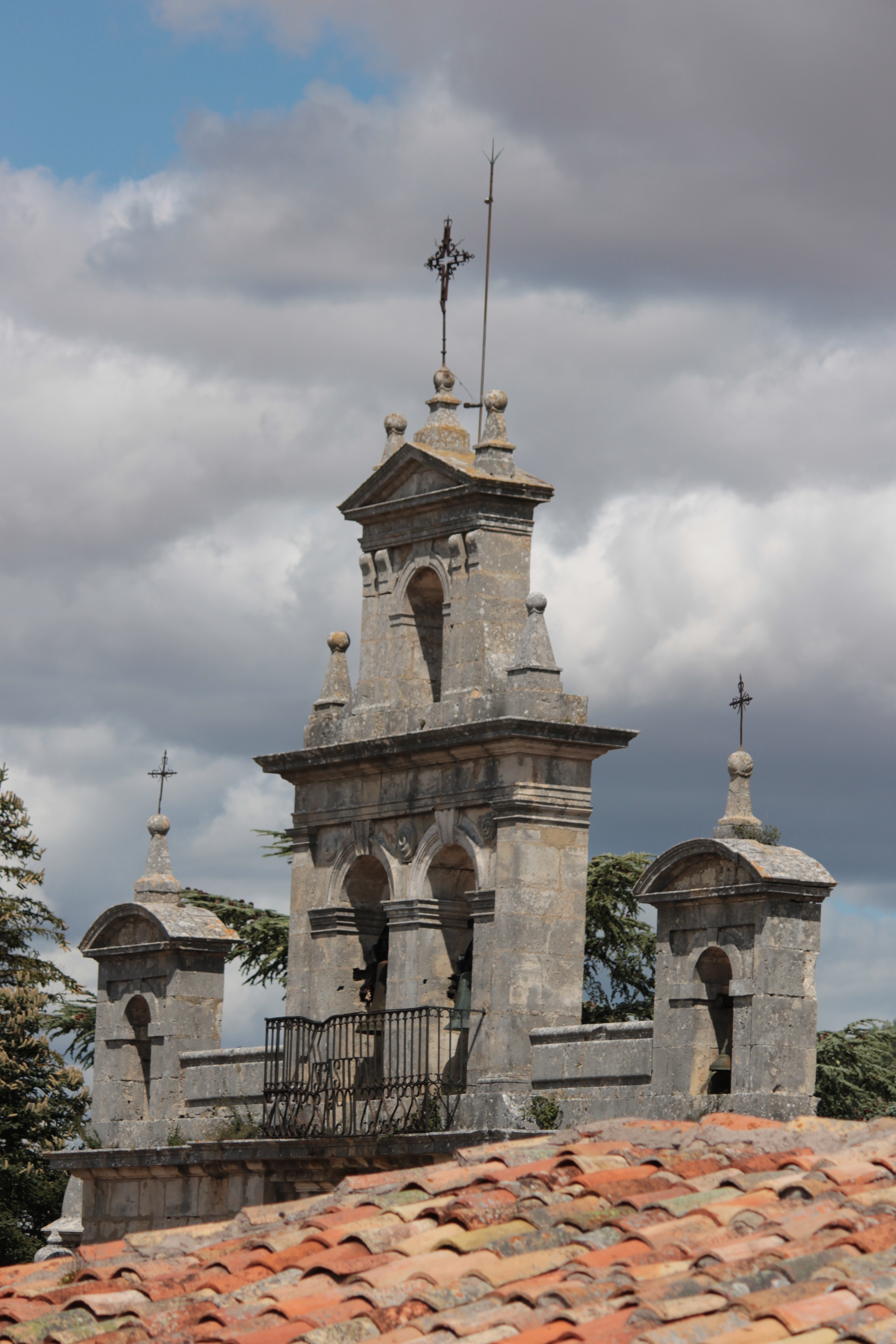 Iglesia del Santuario de Santa Casilda en La Bureba (Burgos)